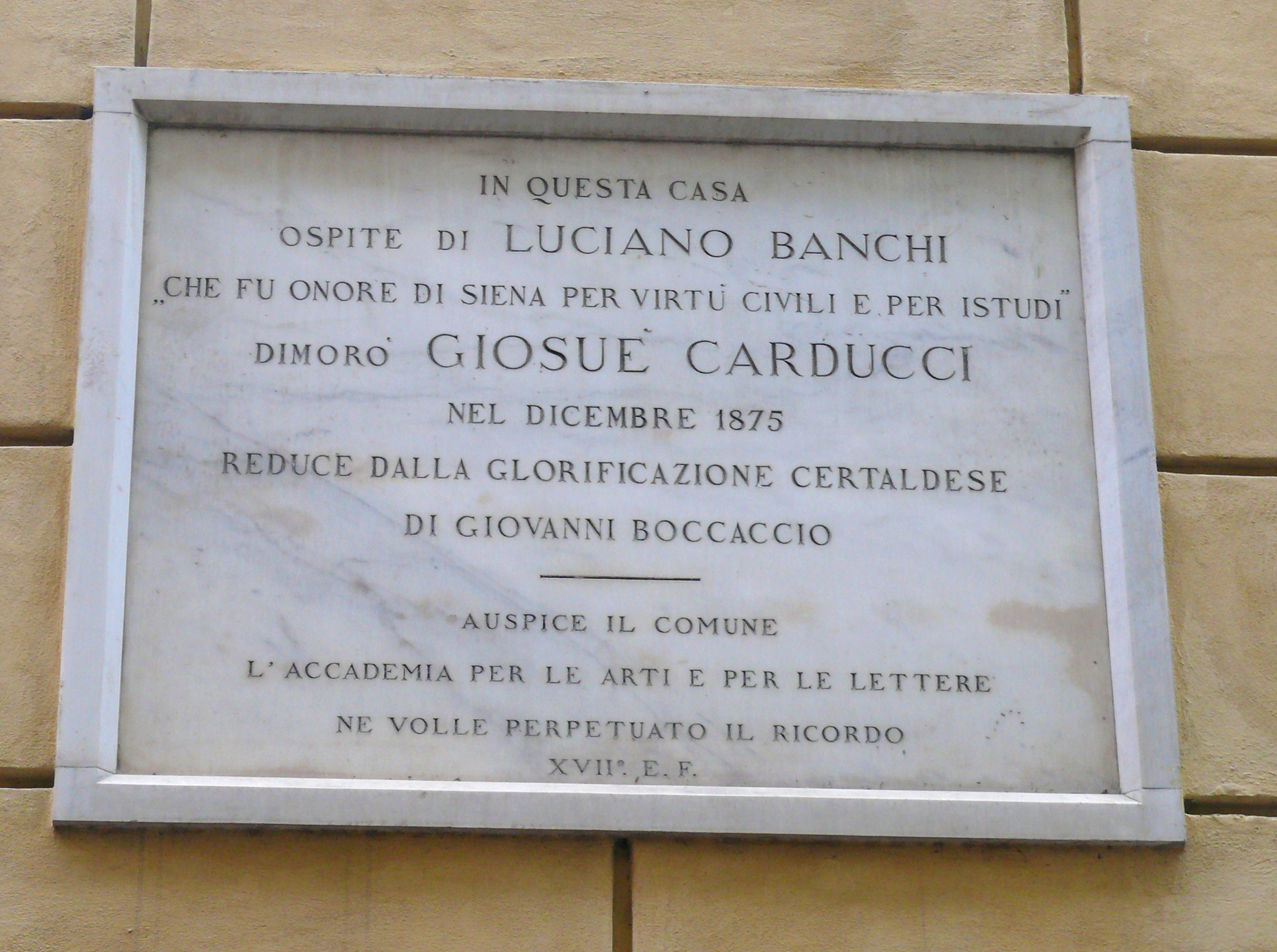 lapide commemorativa del soggiorno di Giosuè Carducci a Siena